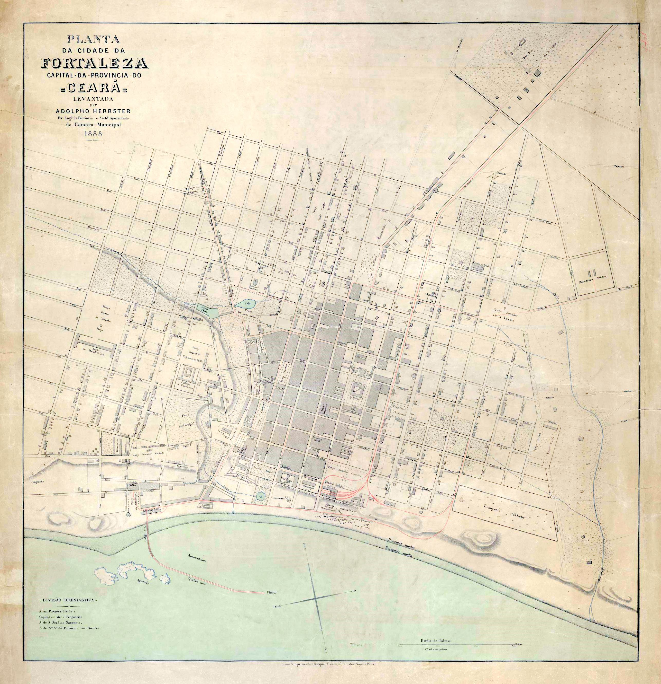 Planta da cidade da Fortaleza capital da provincia do Ceará, por Adolfo Herbster, 1888